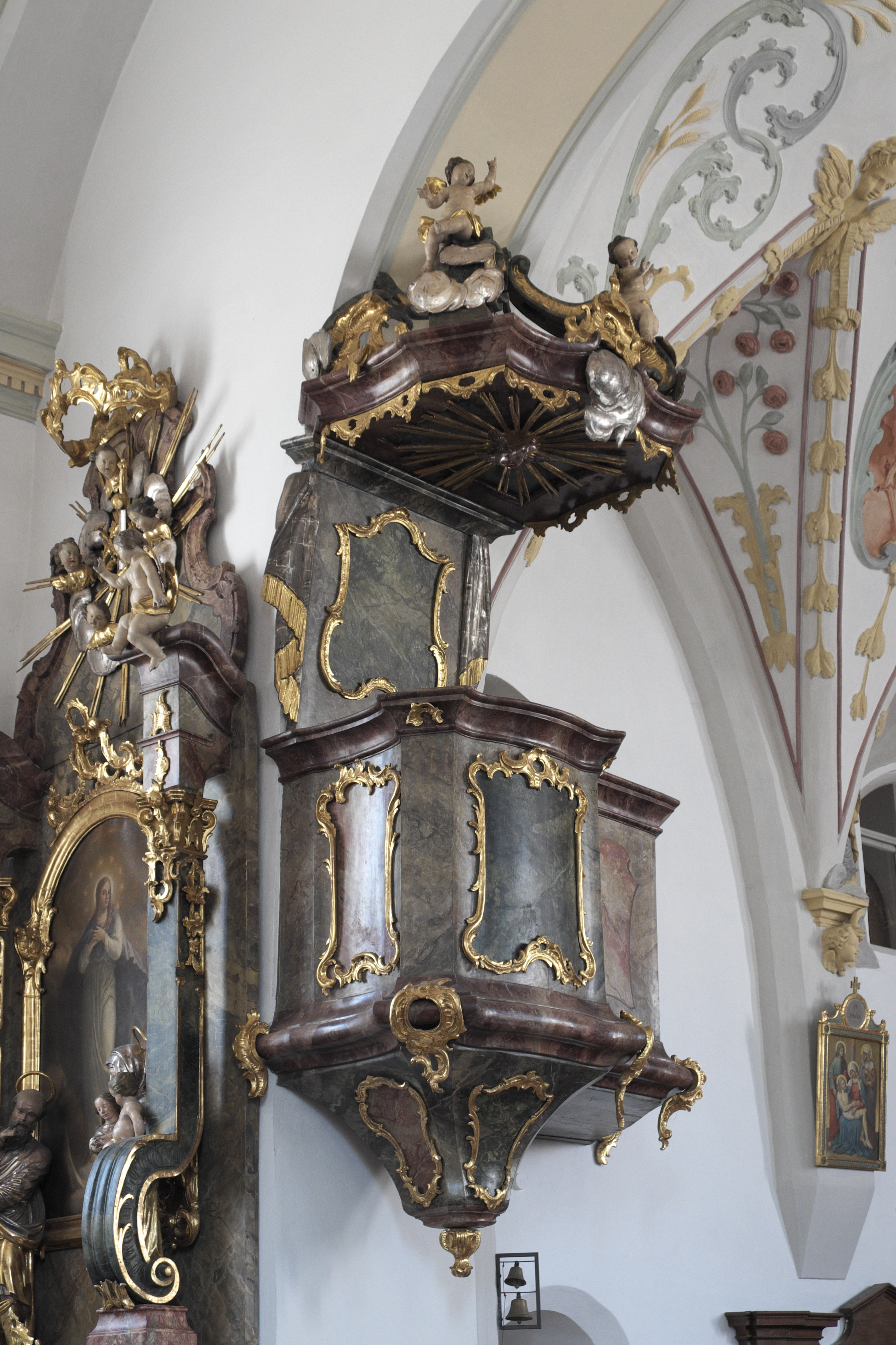 Katholische Pfarrkirche St. Michael in Jesenwang im Landkreis Fürstenfeldbruck (Bayern/Deutschland), Kanzel aus der Mitte des 18. Jahrhunderts